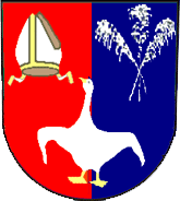 Znak obce Mikulůvka